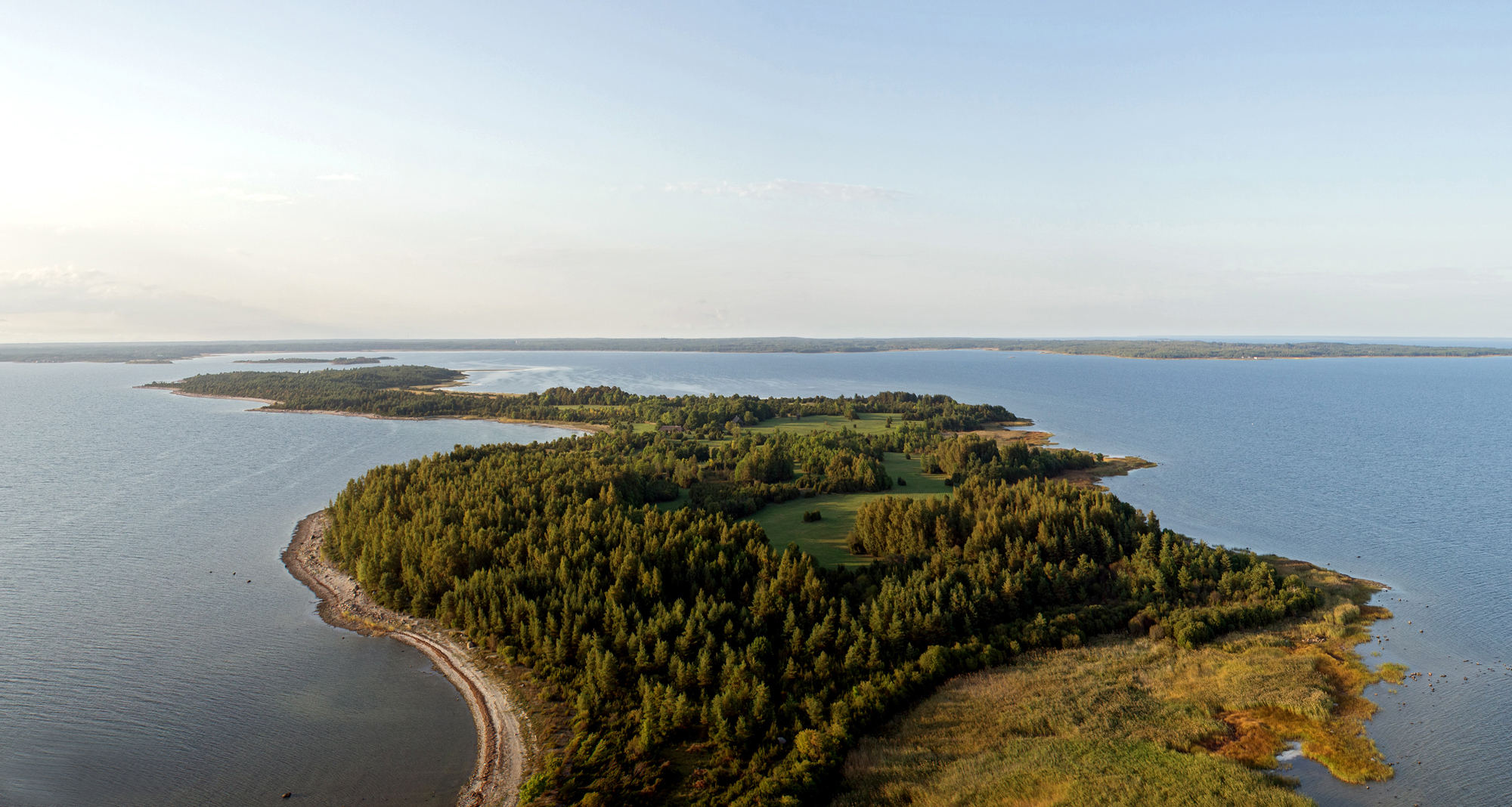 Saarnaki laid. Vaade ülevalt